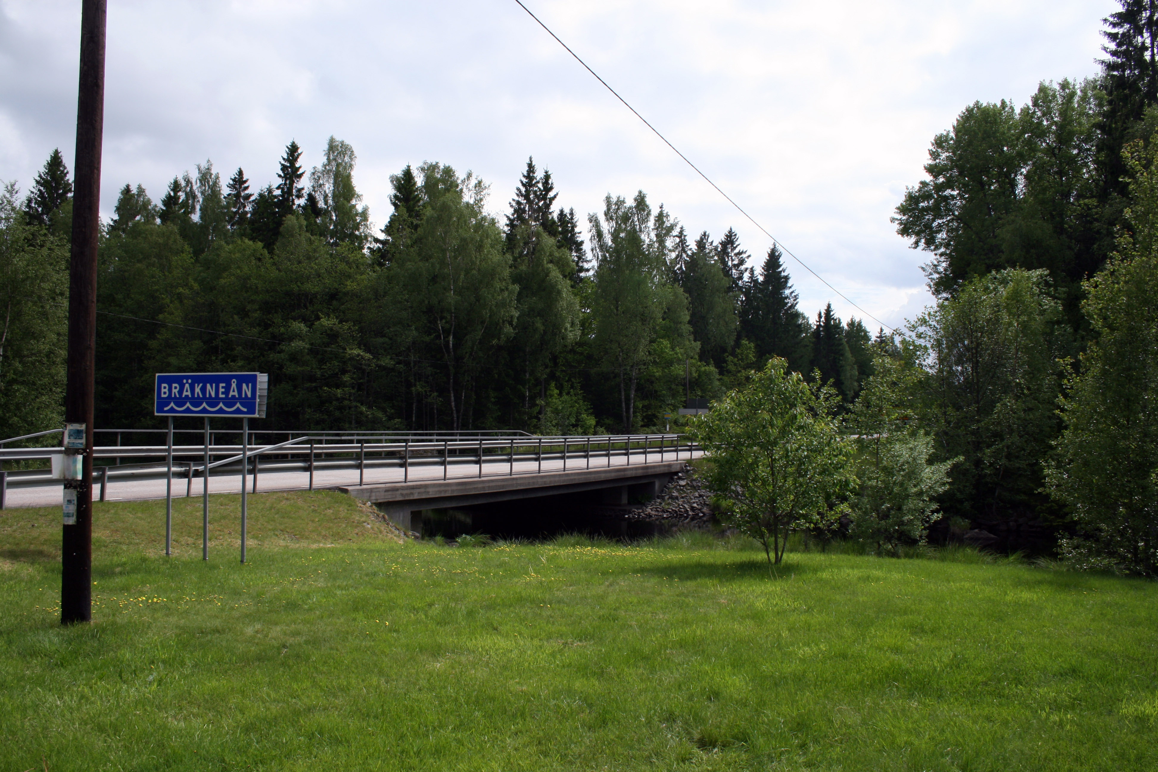 Riksväg 29 vid Bräkneån i södra Småland.